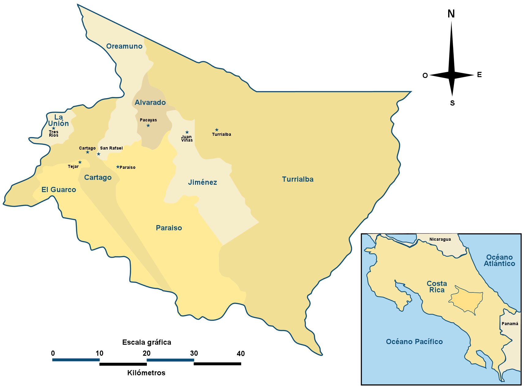 Mapa de la provincia de Cartago, Costa Rica Provincia